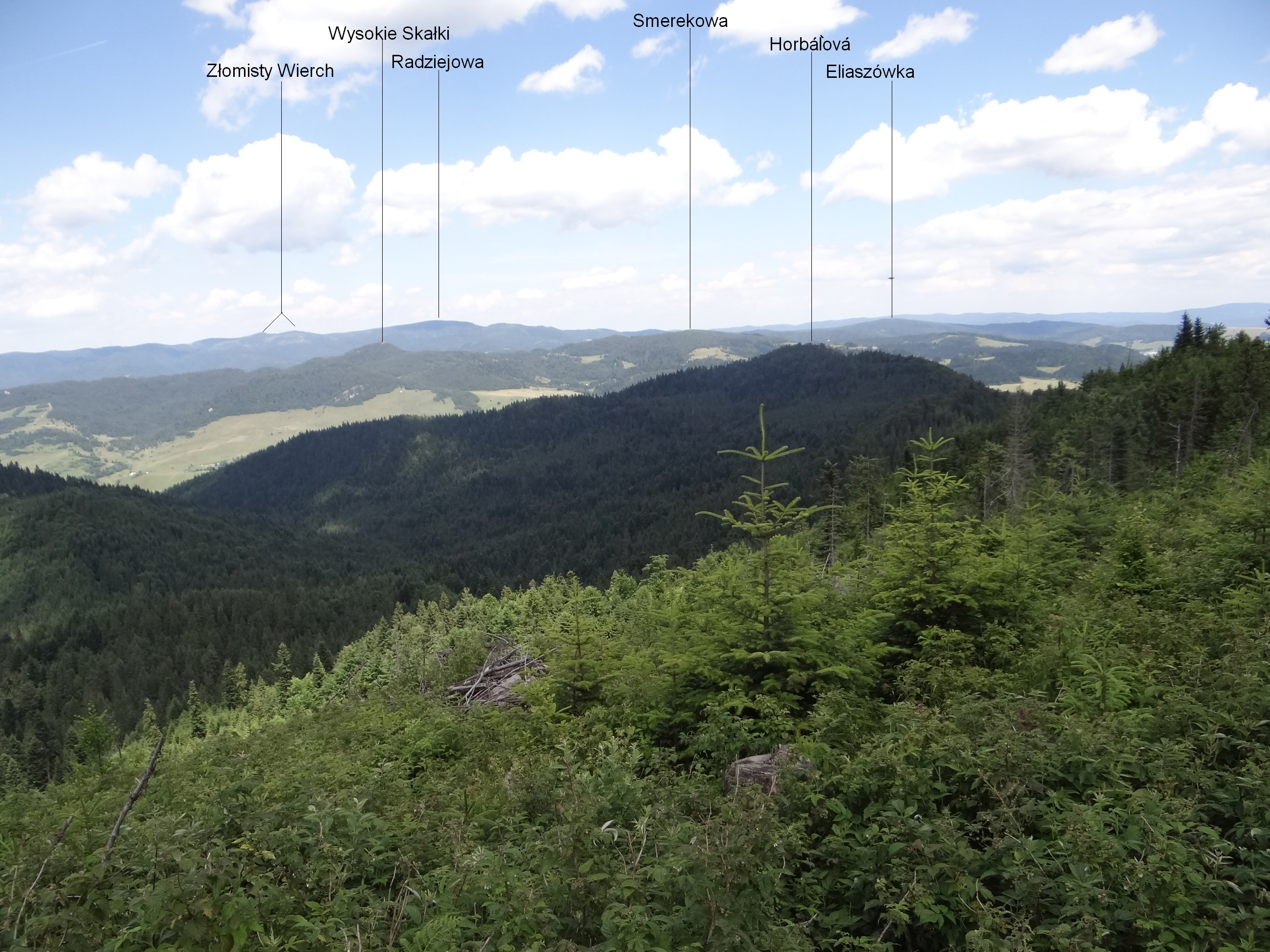 Views from Veterný vrch